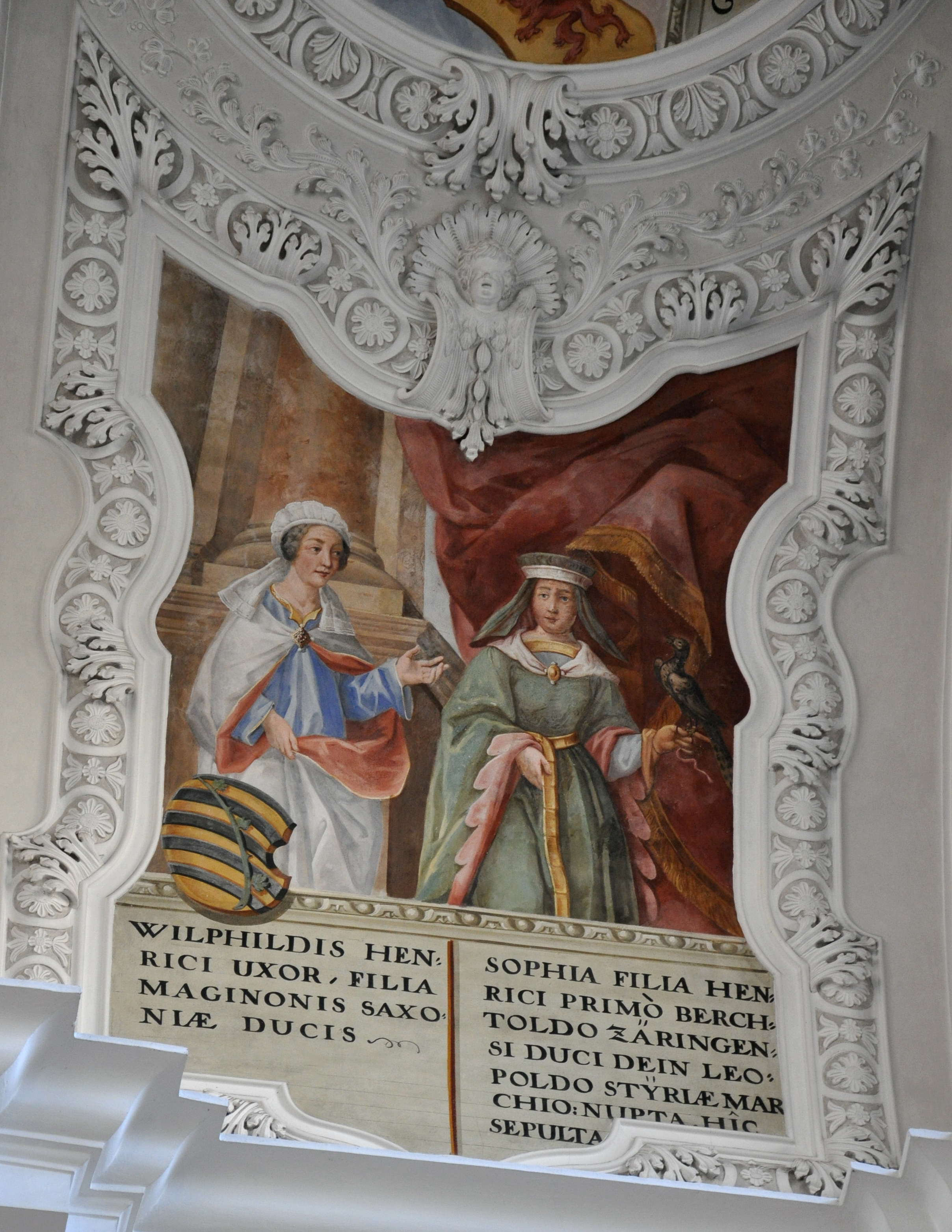 Weingarten (Württemberg) , Basilika St. Martin und Oswald, Fresken von Cosmas Damian Asam, 1718–1720 Fresken im 2. Langhausjoch, Thema: Welfen; südliche Quertonne: Wulfhild und Sophia